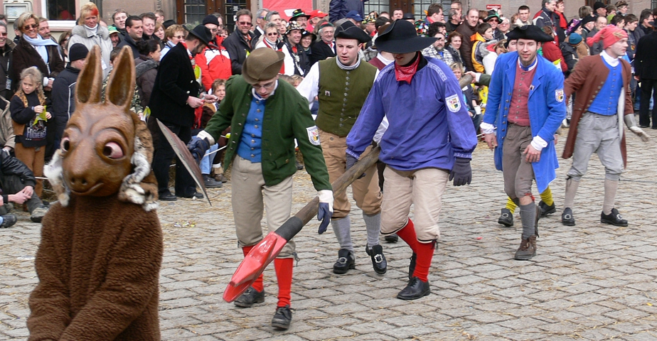 Trommgesellenzunft Munderkingen, Gruppe: Sieben Schwaben Veranstaltung: Narrensprung beim Narrentreffen Meßkirch 2006